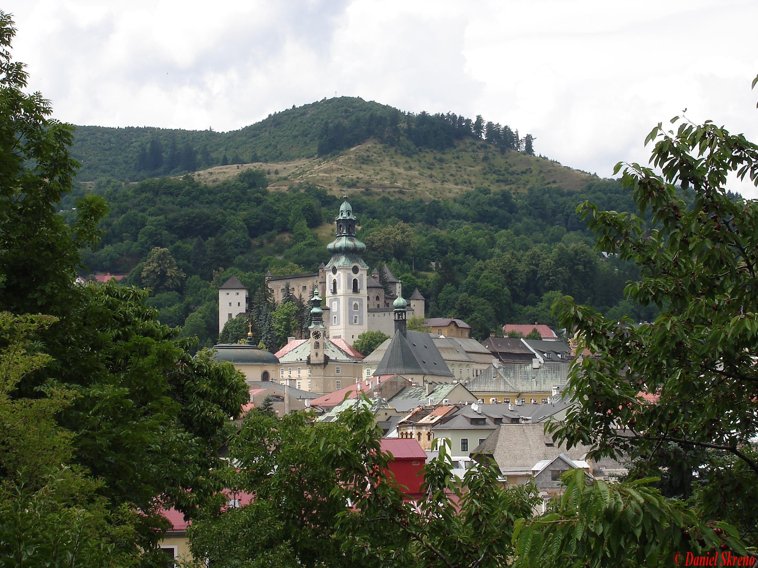 Description Banska Stiavnica- pohlad z Katovej ulice Creative Commons CC-BY-SA-2.5 Banska Stiavnica- pohlad z Katovej ulice